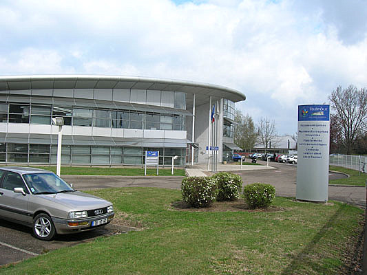 Télépôle à Roanne